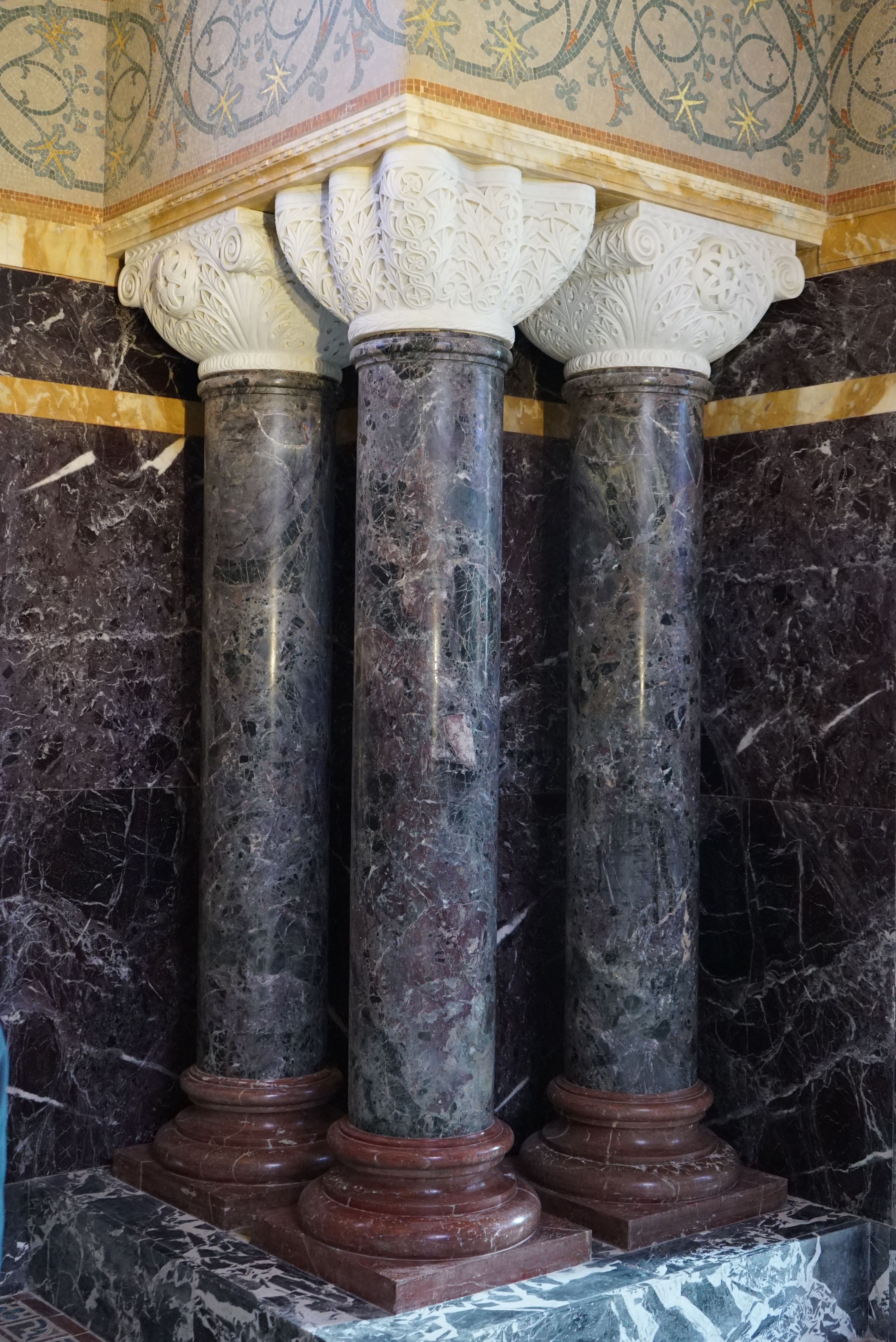 vue du Mausolée de Bourgogne.